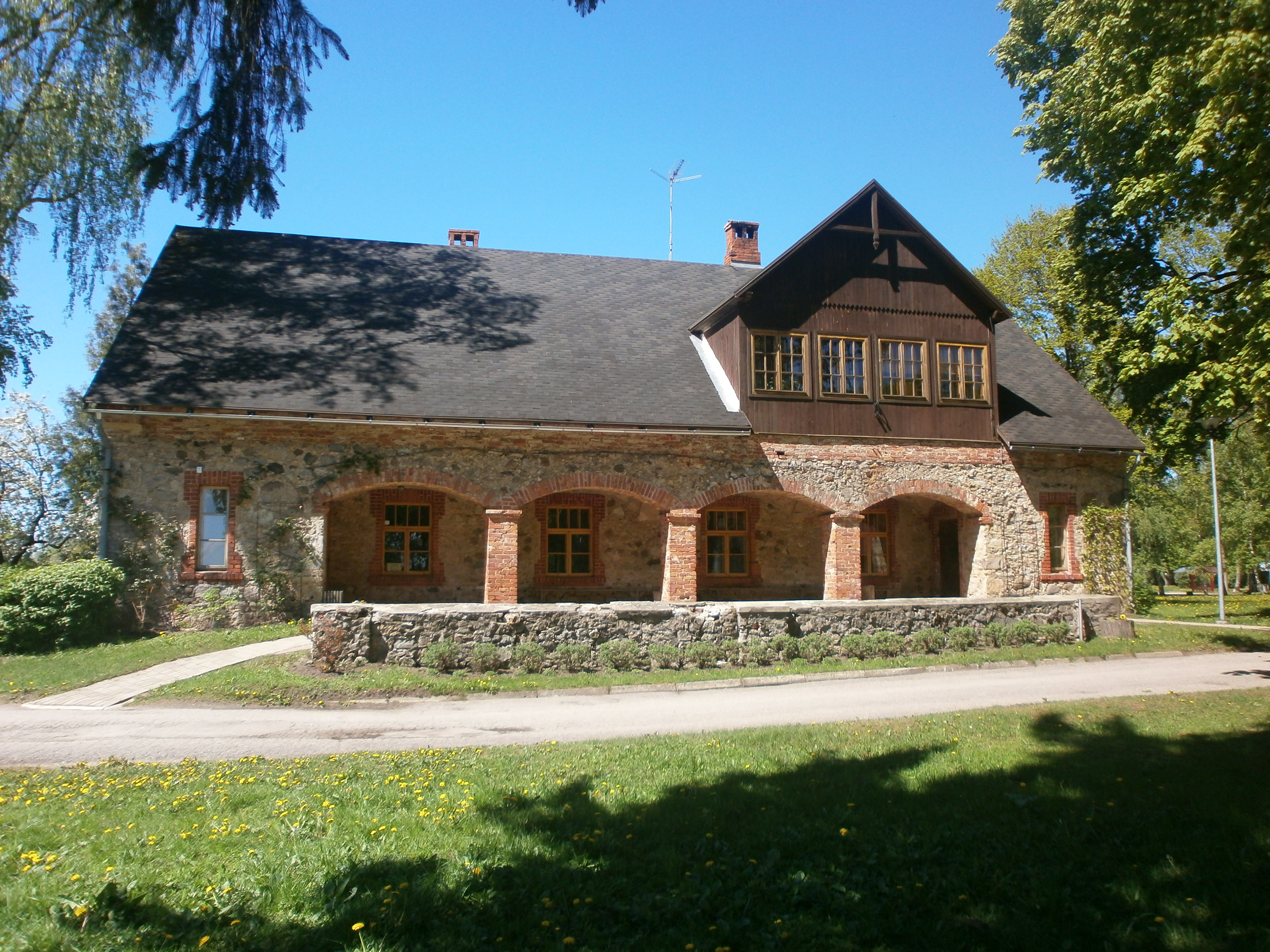 Lielvārdes muižas klēts, Lielvārde, E.Kauliņa aleja 20